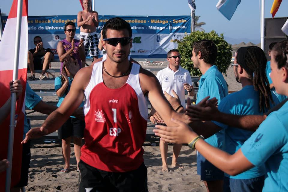 Miguel Angel de Amo lors d'un tournoi